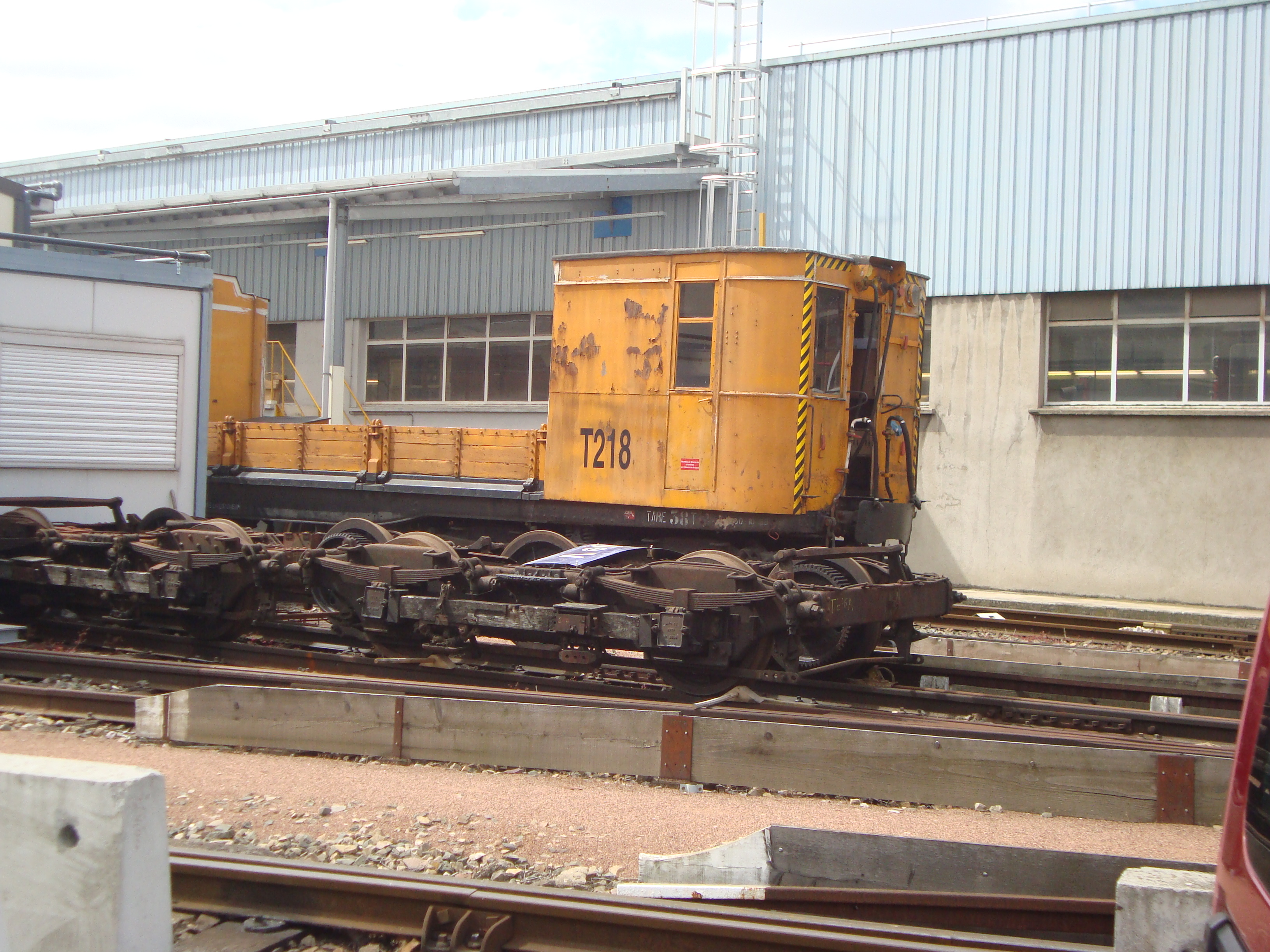 Tracteur Sprague aux ateliers du métro de Paris à La Villette.